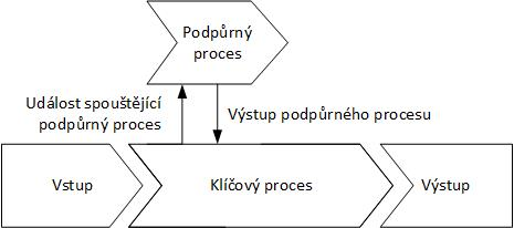 Vzor pro globální mapu procesů využívanou metodikou MMABP.